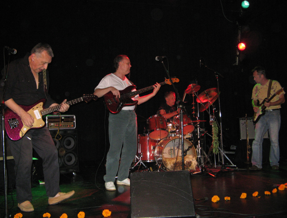 German band Guru Guru, live at Karlstorbahnhof in Heidelberg/Germany, September 27, 2007. Left to right: Hans Reffert, Peter Kühmstedt, Mani Neumeier, Roland Schaeffer Other pictures from the same concert: Image:Guru_Guru_2007-09-27.jpg, Image:Mani_Neumeier_2007-09-27.jpg